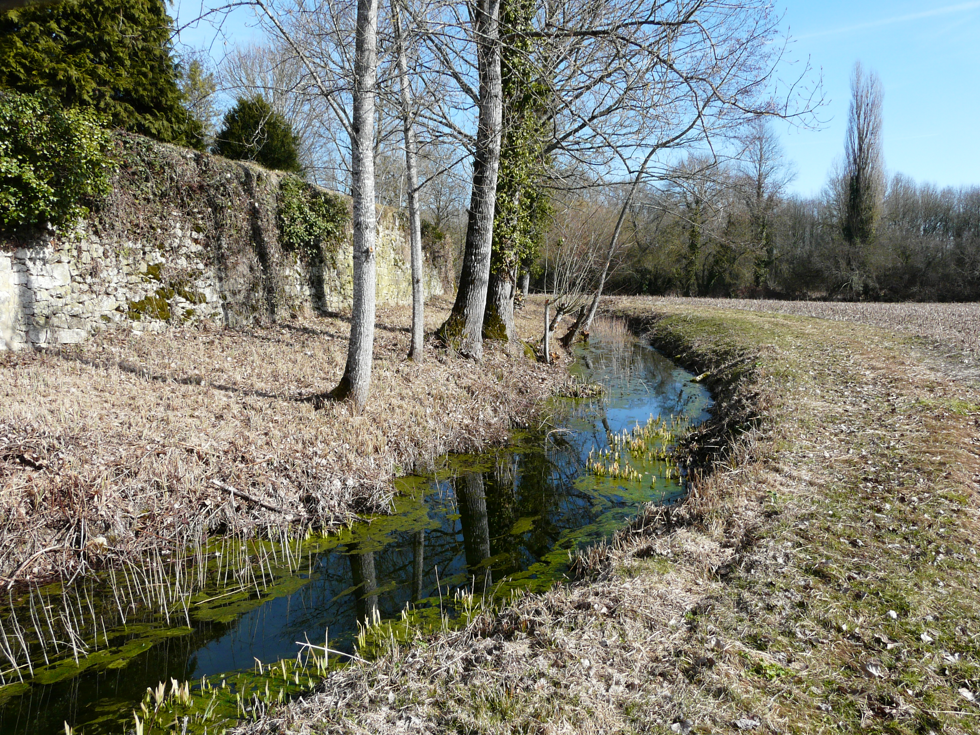 La Julie au pied du château de la Tour-Blanche, Dordogne, France. Vue prise en direction de l'amont. Elle marque la limite entre les communes de La Tour-Blanche à gauche et Cercles, à droite.